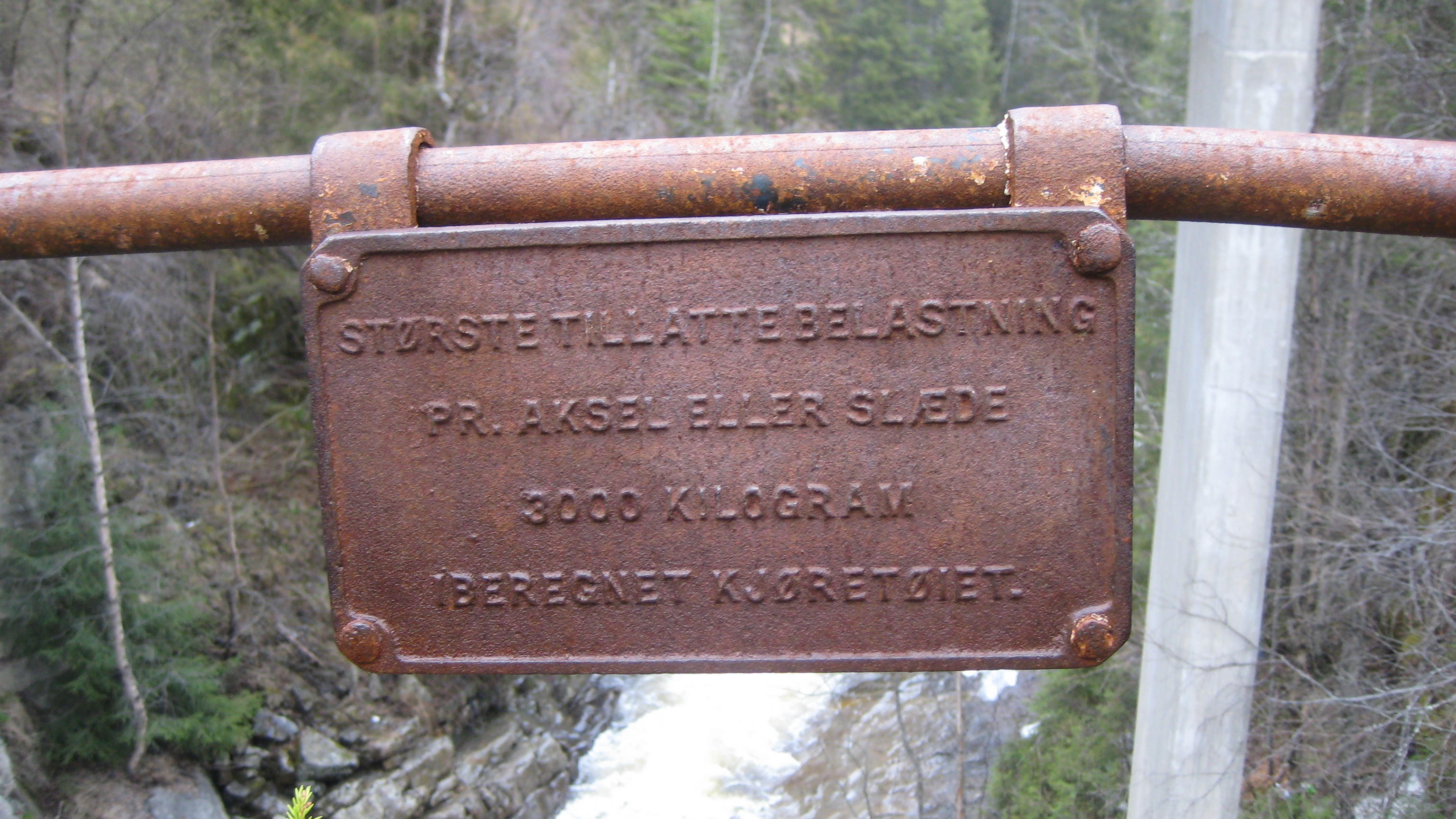 Akseltrykket på gamle Kjøljua Bru